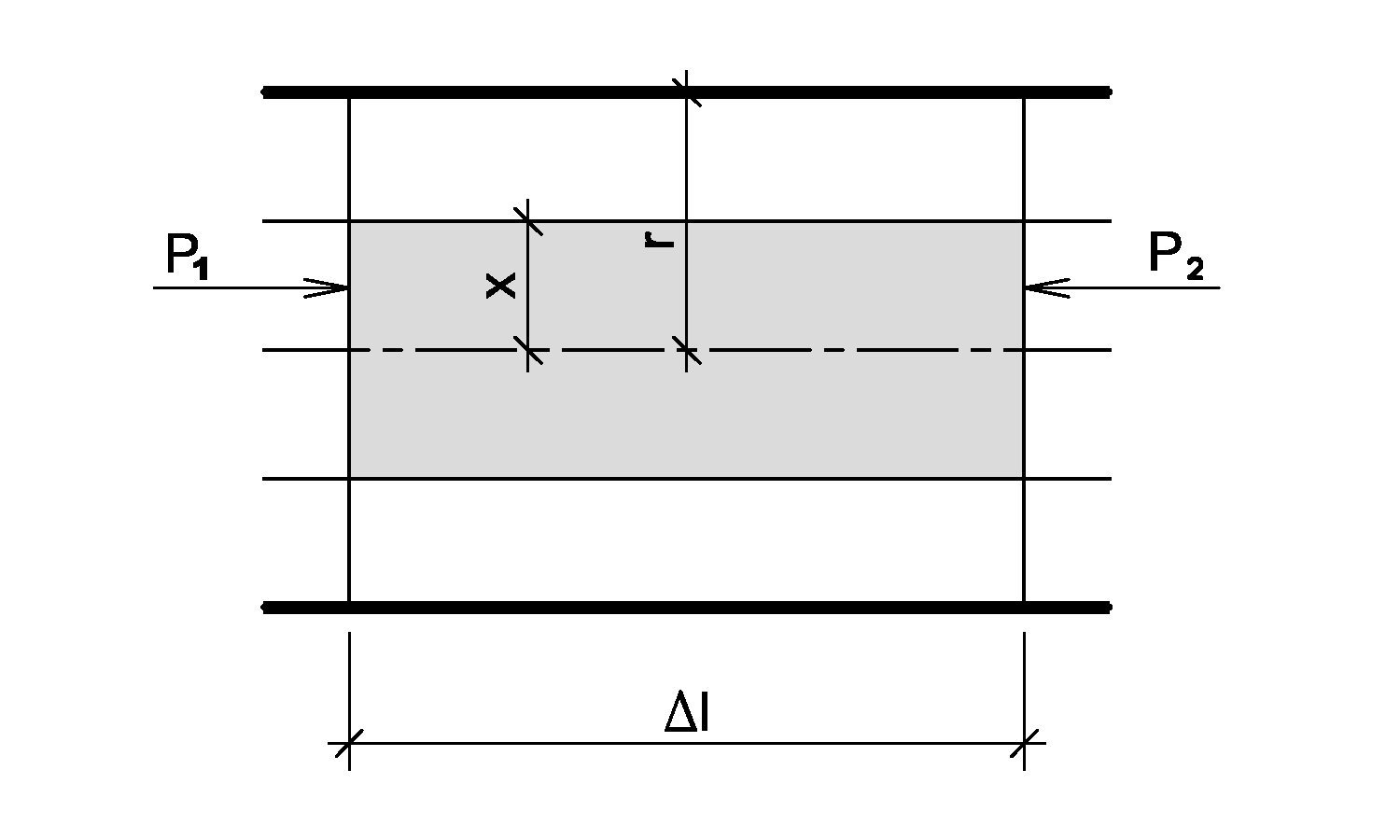 Jednoduché schema pro lepší pochopeni odvozeni laminarnihi proudění